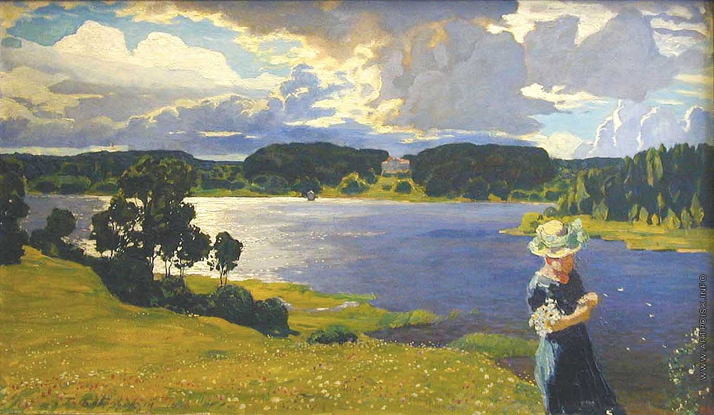 Бобровский Г. М. Название У реки Год создания 1916 Материал Холст, масло Размер 45 x 76,5 Собрание Ивановский областной художественный музей